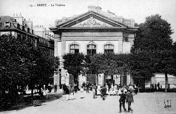 Le théâtre, place du ‘’Champ de Bataille’’ (actuelle place Wilson, à Brest, France) (architecte : Antoine Choquet de Lindu).